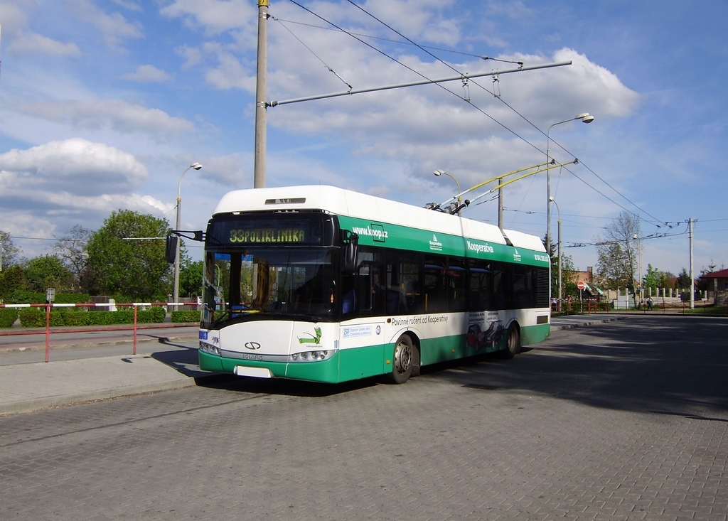 Solaris Trollino 12AC, DPChJ a.s.